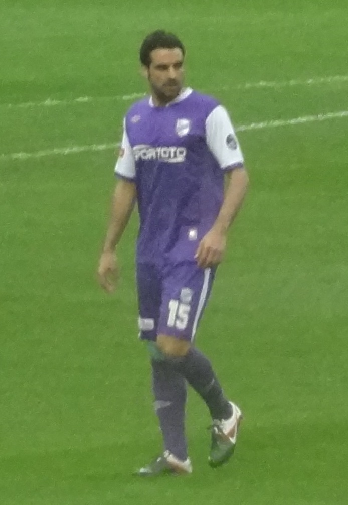 GArcia Galatasaray karşısında.